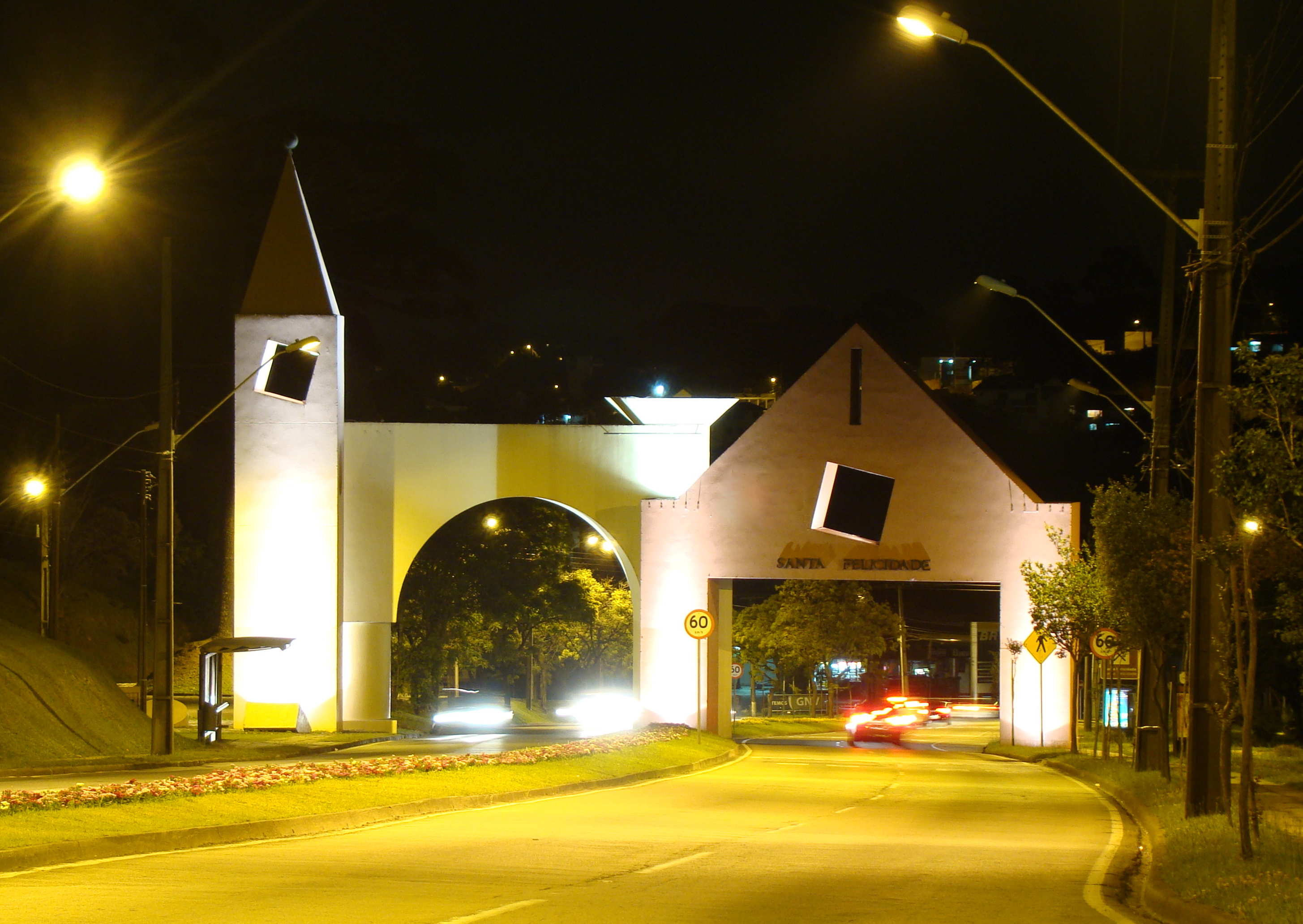 Imagem noturna do Portal de Santa Felicidade, bairro italiano de Curitiba, Paraná (sul do Brasil).